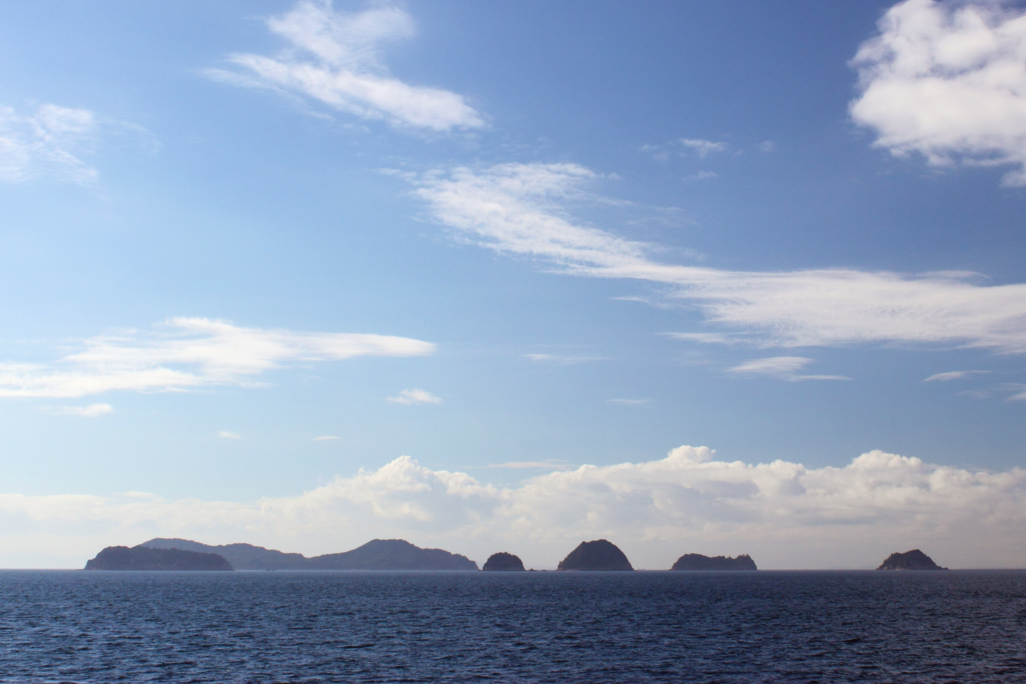 家島諸島 松島 左より「桂島（かつらじま）」（手前）、「松島（まつしま）」（後方、写真で最大の島）、「小ツフラ島」、「大ツフラ島（おおつふらじま）」、「長島（ながしま）」、「三ツ頭島」